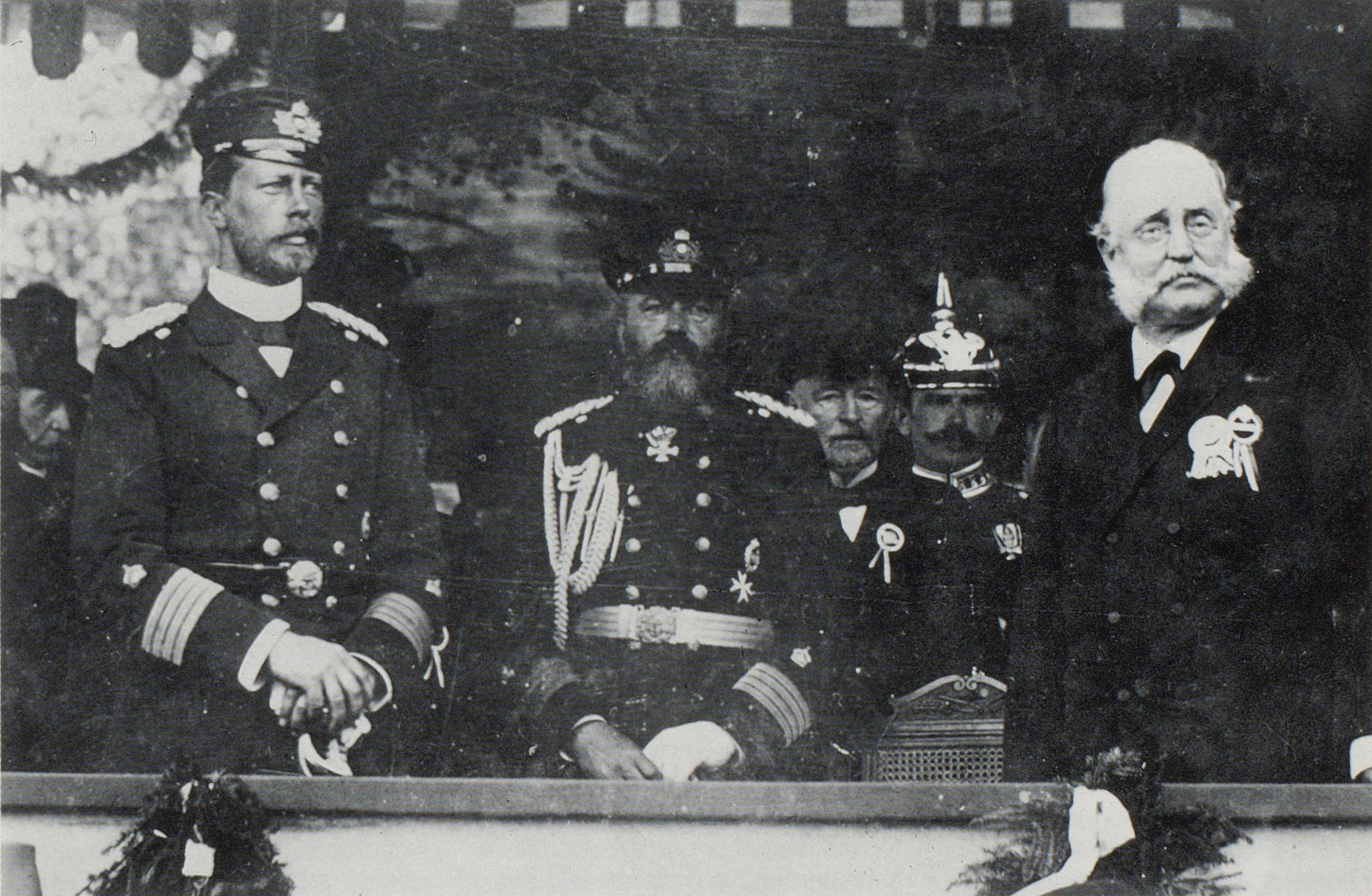 Max Eyth (rechts) bei der Eröffnung der 8. Wanderausstellung der Deutschen Landwirtschafts-Gesellschaft (DLG) 1894 in Berlin. Links am Bildrand der damalige DLG-Präsident Prinz Heinrich von Preußen, der jüngere Bruder von Kaiser Wilhelm II.